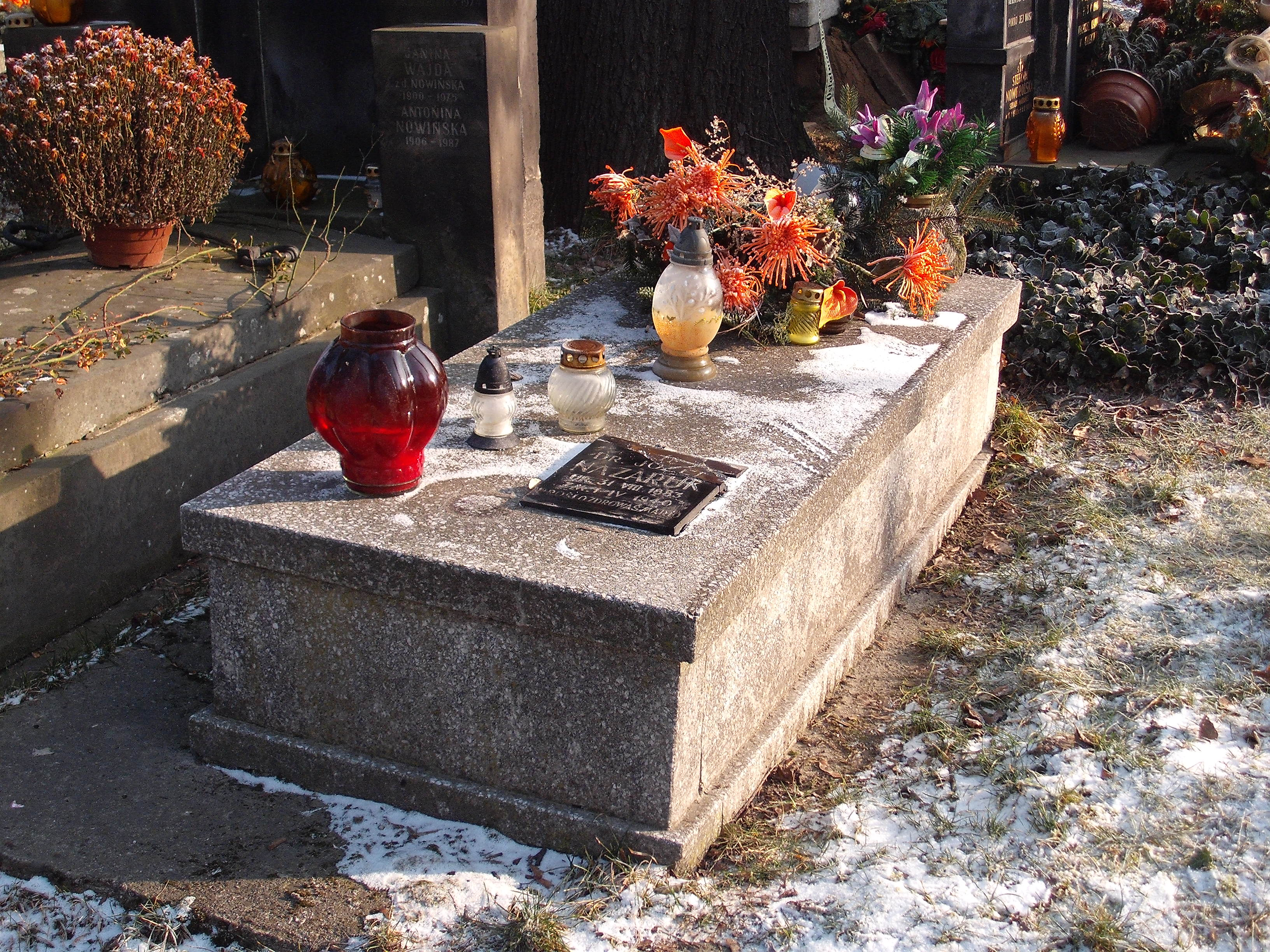 Grób Osypa Nazaruka na Cmentarzu Rakowickim w Krakowie